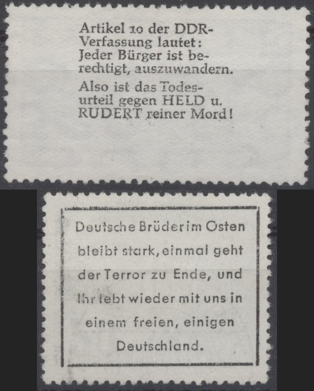 Vom Fälscher W.P. Kleine hergestellte rückseitige Propagandaaufdrucke auf div. Briefmarken.